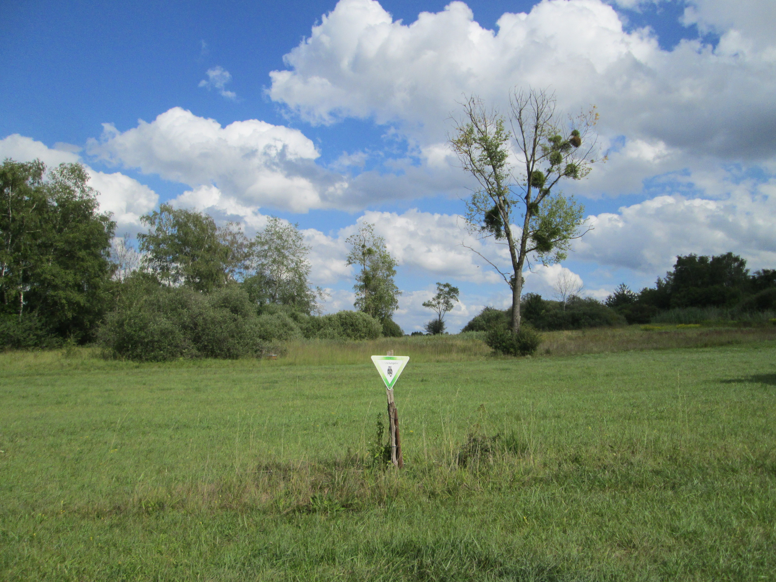 Naturschutzgebiet „Wusterhang und Beierwies“ bei Fechingen, Teilgebiet Beierwies